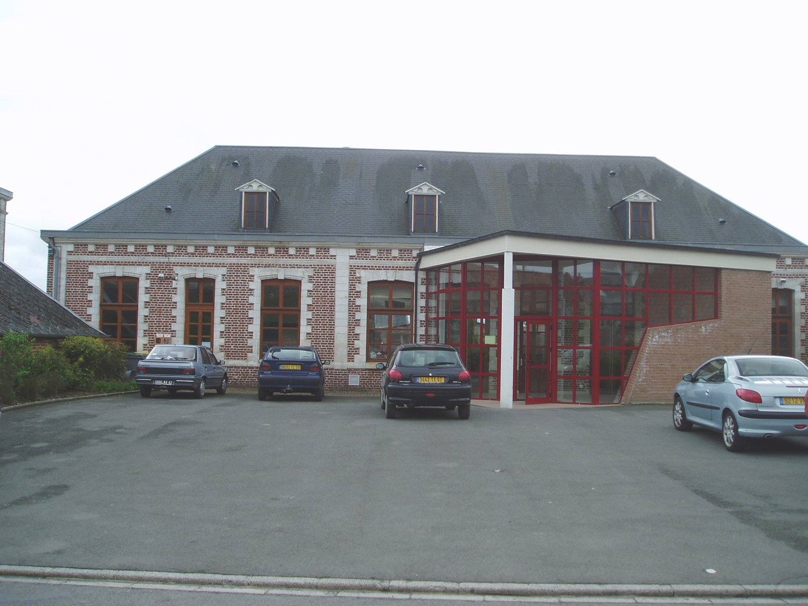 Photographie de la façade de la salle des fêtes du village d'Acq, Pas-de-Calais, France, prise le 29 avril 2005, retouchée avec the Gimp. Gloran 15:28, 6 December 2006 (UTC)